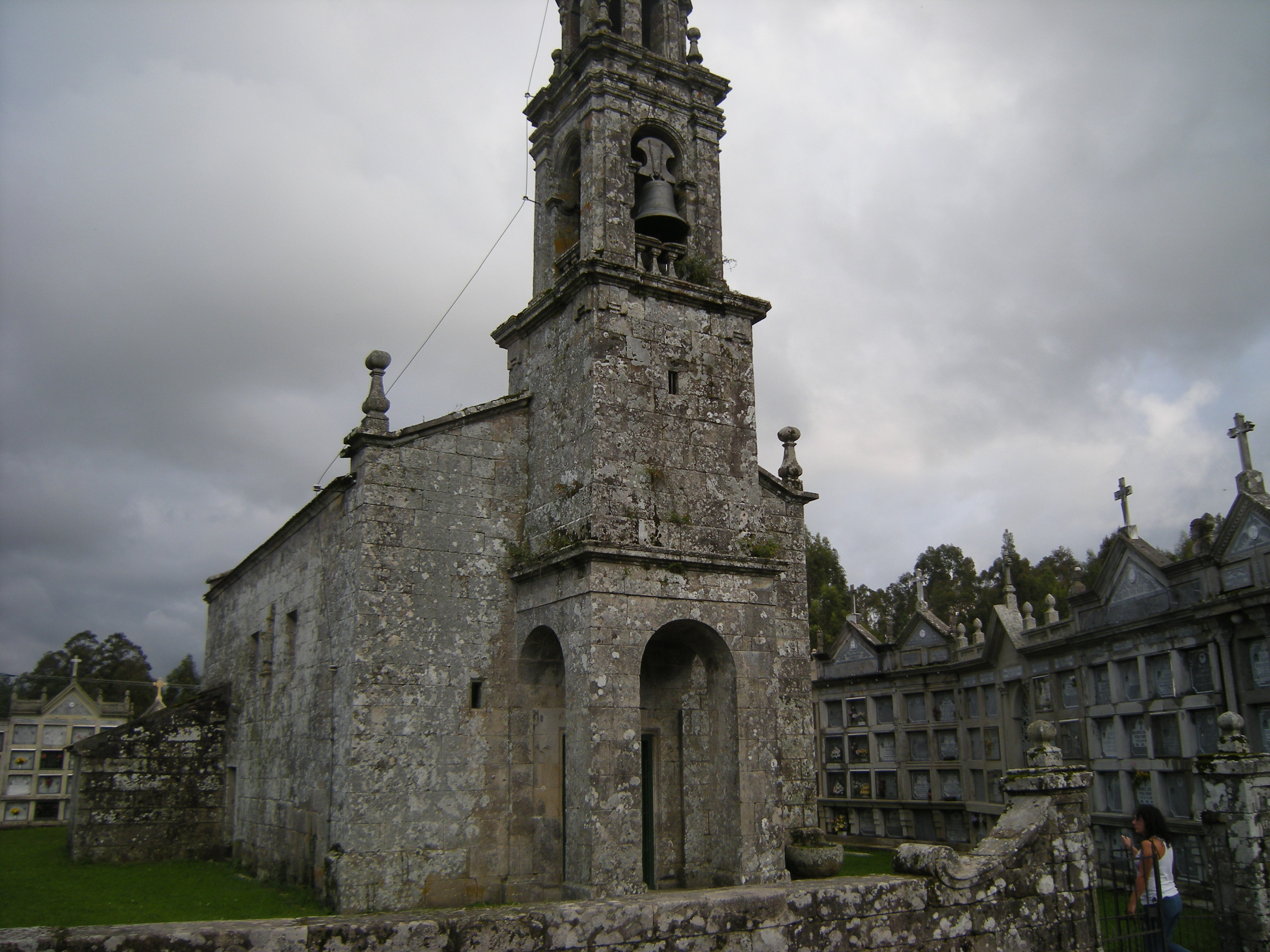 Igrexa de Santiago de Tabeirós, A Estrada